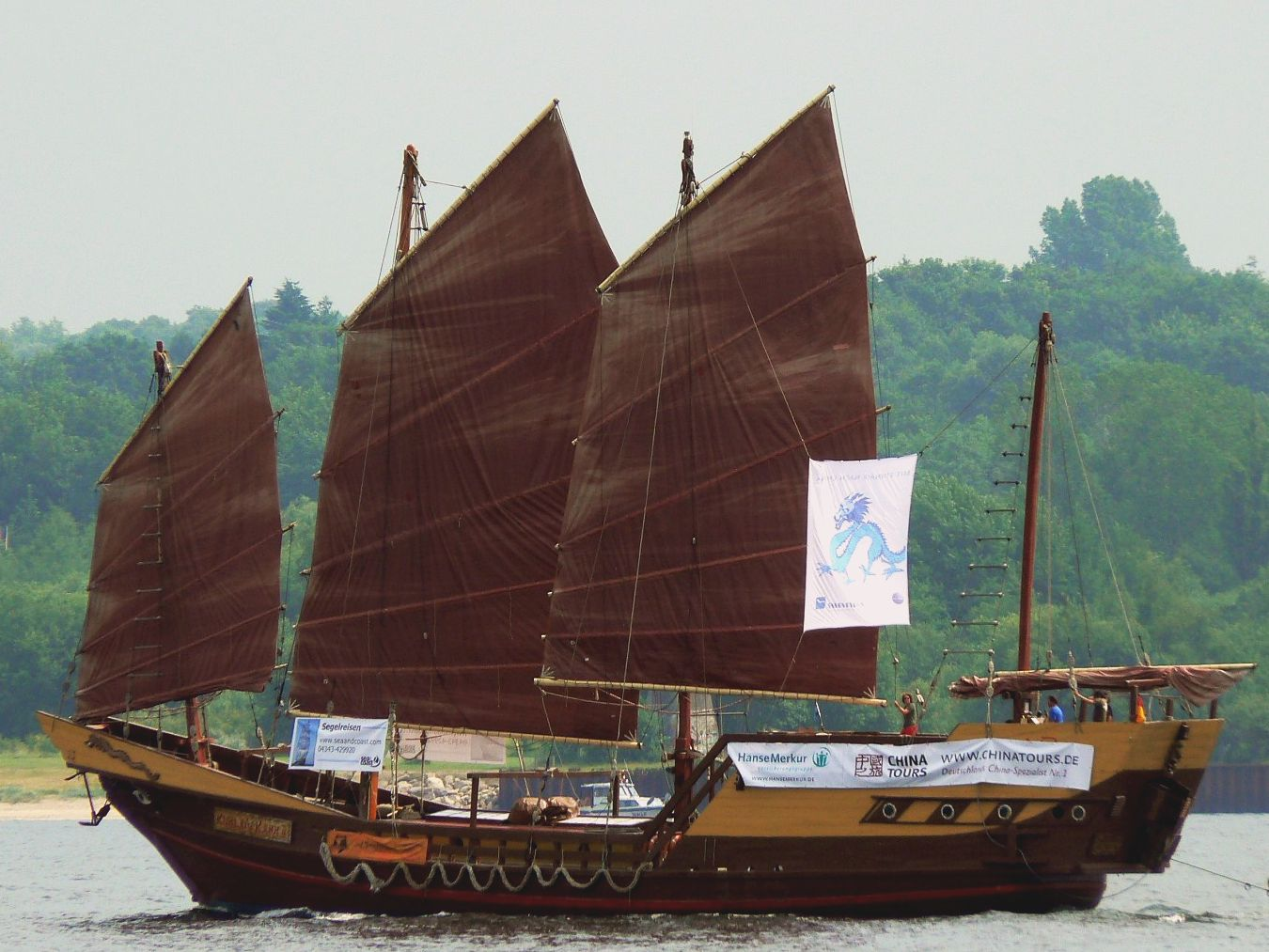 Segelschiff (Dschunke) Kublai's Khan II auf der Kieler Woche 2007. Typ: Traditionelle Indonesische Pinisi. Takelage: Dschunkenrigg. Baujahr: unbekannt (Umbau: 2003).